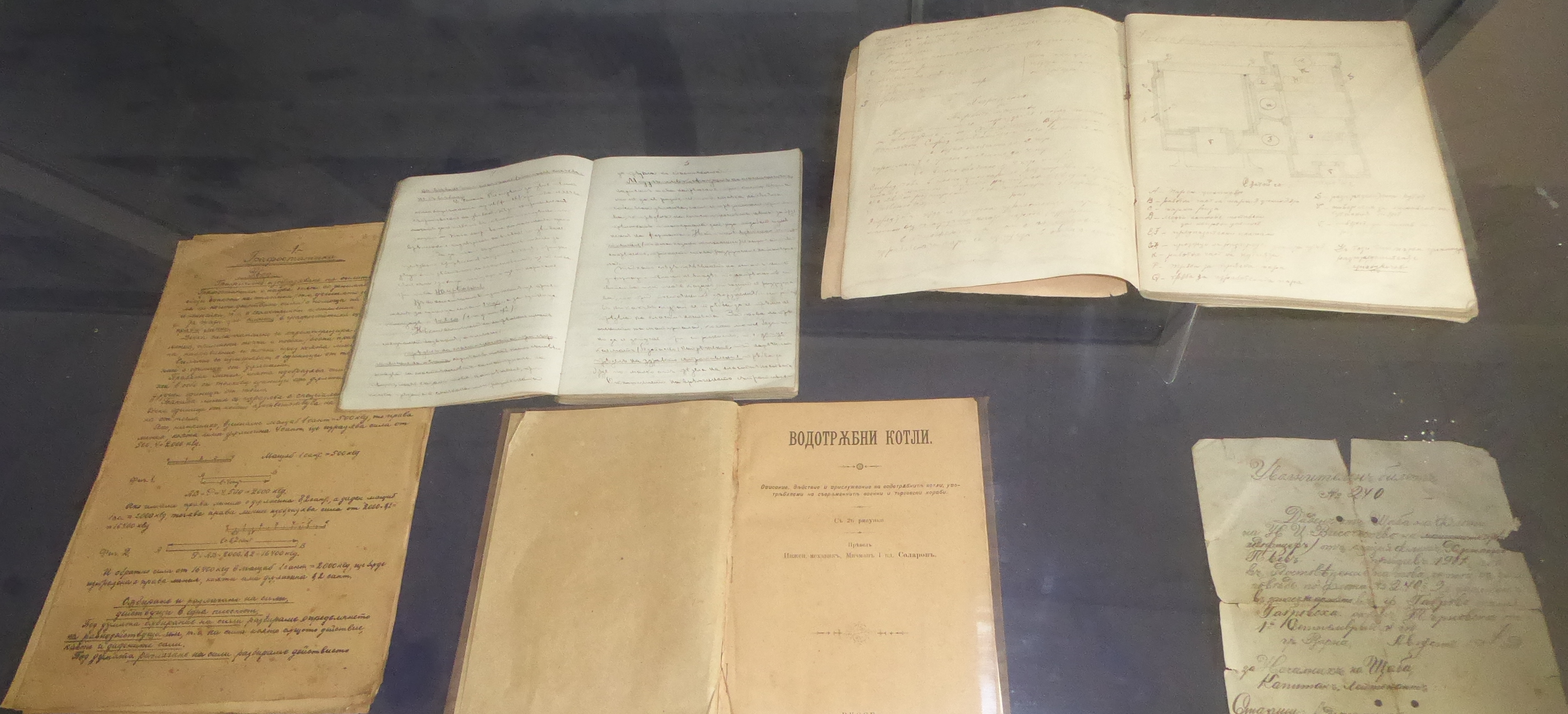 Marineakademie Warna-Lehrbücher und Entlassungschein 1911